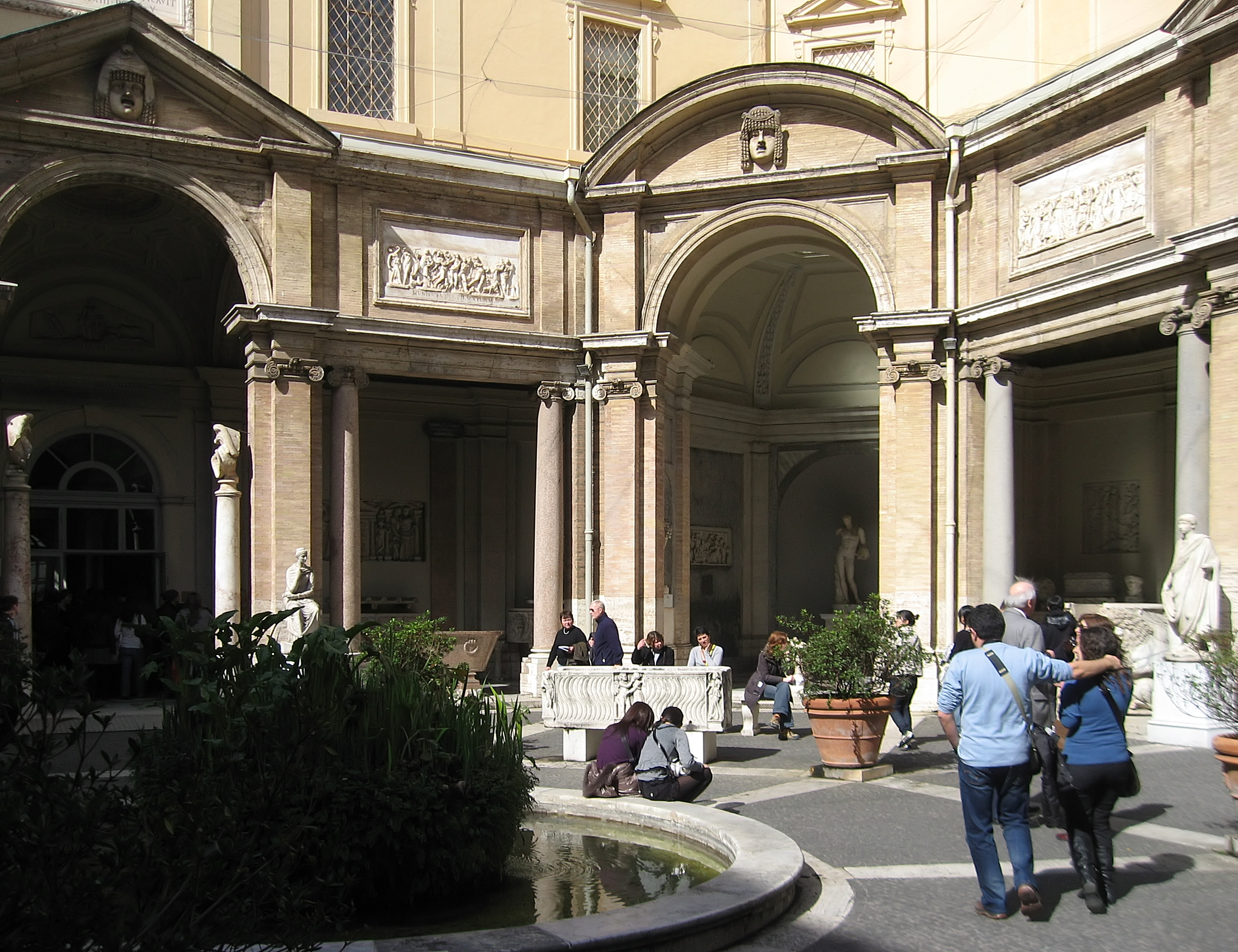 Vatikanpalast in Rom/Italien: Cortile Ottagonale - achteckig angelegter Innenenhof des Belvedere-Palastes (1773)